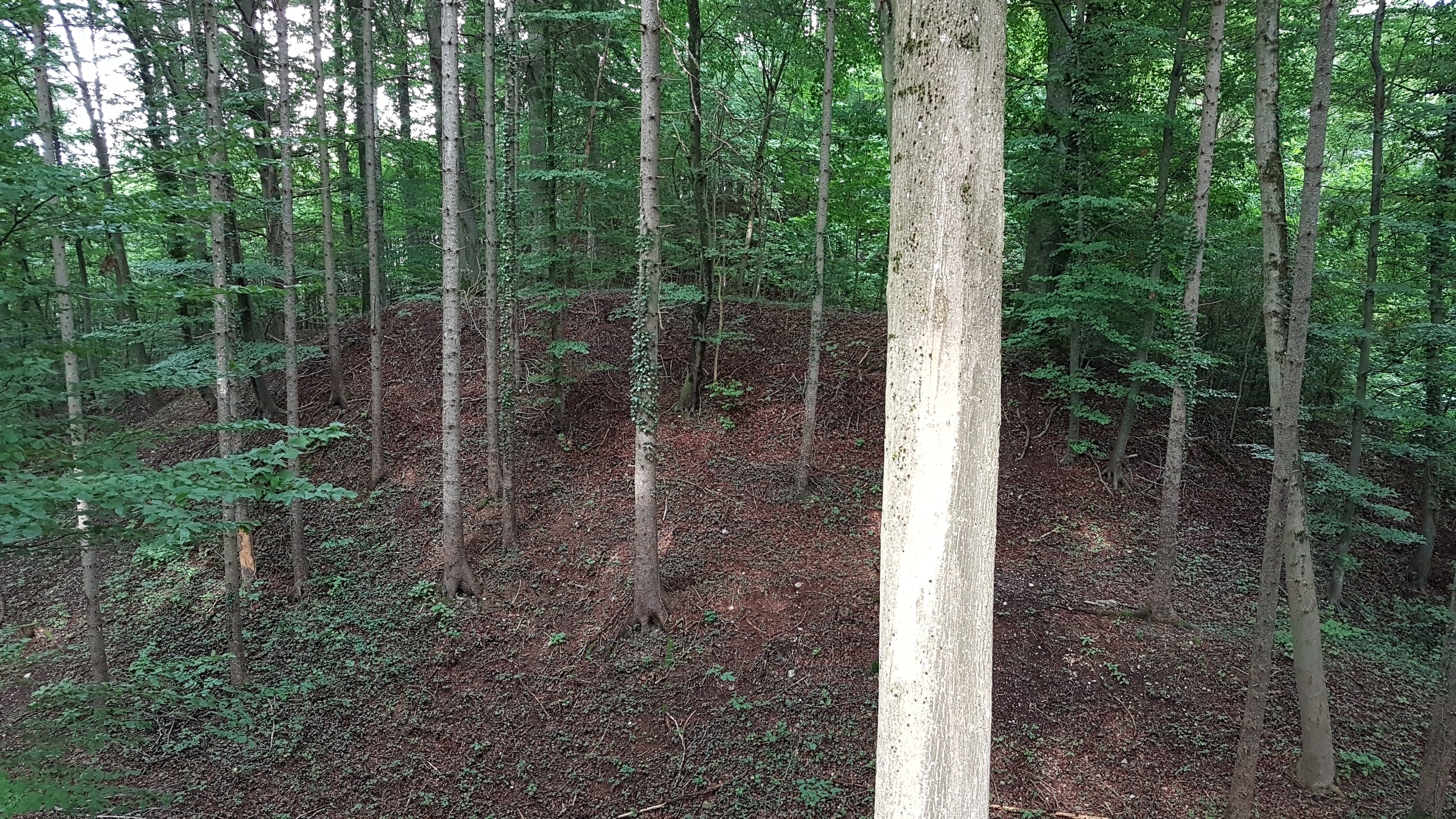 Haus bei Törring (Tittmoning), Burg Törring, innerer Burghügel